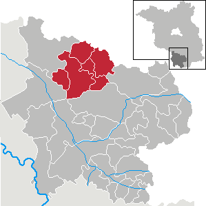 Amt Schlieben in Brandenburg (Country) - District Elbe-Elster